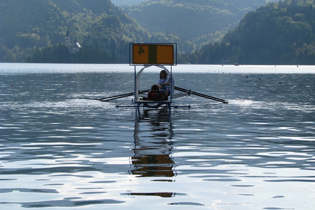 Start na veslaški regati na Blejskem jezeru, Slovenija